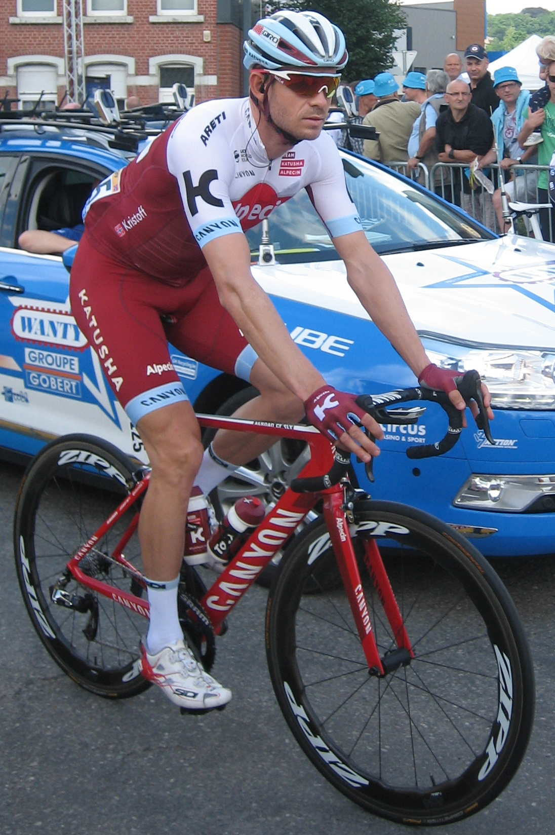 Start in Verviers (België) van de 3e etappe van Le Tour de France 2017.